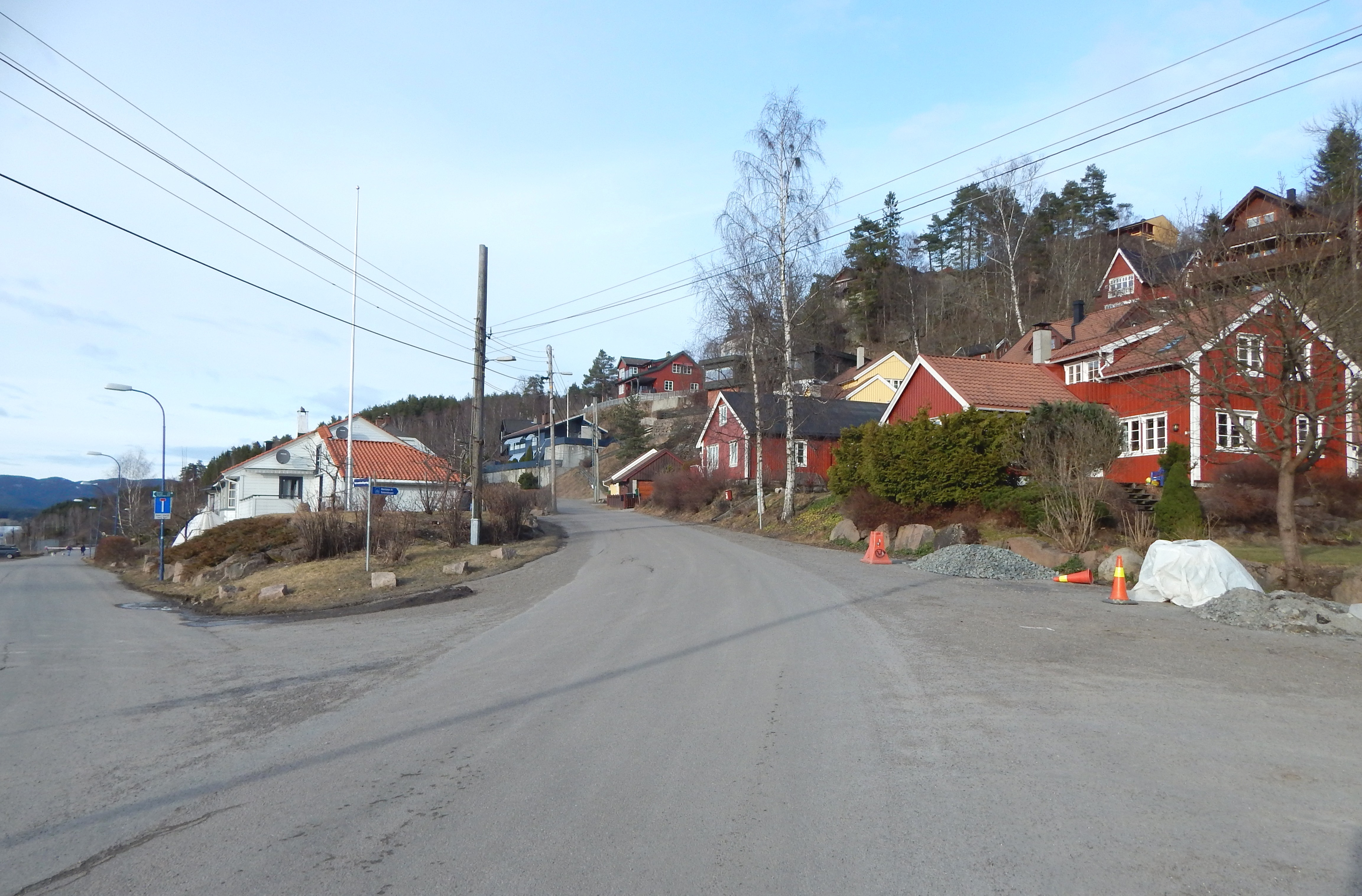 Midtoddveien i krysset ved Myrerveien